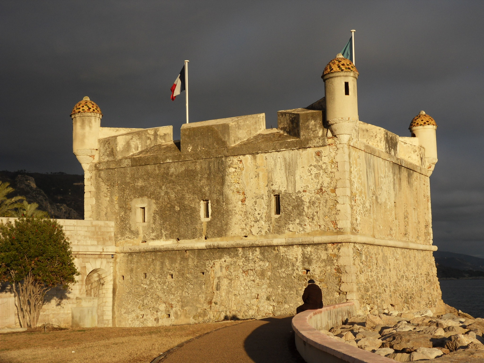 Menton (Alpes-Maritimes) Le Bastion. Bâti en 1636-1639 par Honoré II de Monaco pour défendre la ville. On accédait au fortin grâce à un pont mobile en bois. Grenier à sel au XIXe siècle, prison durant la dernière guerre; En 1957, le peintre Jean Cocteau restaura l’édifice, et le décora pour y abriter ses oeuvres.